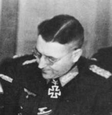 Im Hauptquartier der Heeresgruppe Weichsel Personen hinter Hitler von links: Generalleutnant Wilhelm Berlin; General der Artillerie im OKW Generalfeldmarschall Robert Ritter von Greim; Kommandeur der Luftflotte 6 Generalmajor Franz Reuß; Kommandeur einer Flieger-Div. General der Flakartillerie Job Odebrecht, Kommandierender General des II. Flak-Korps (mot) Generalleutnant Theodor Busse ; Oberbefehlshaber der 9. Armee